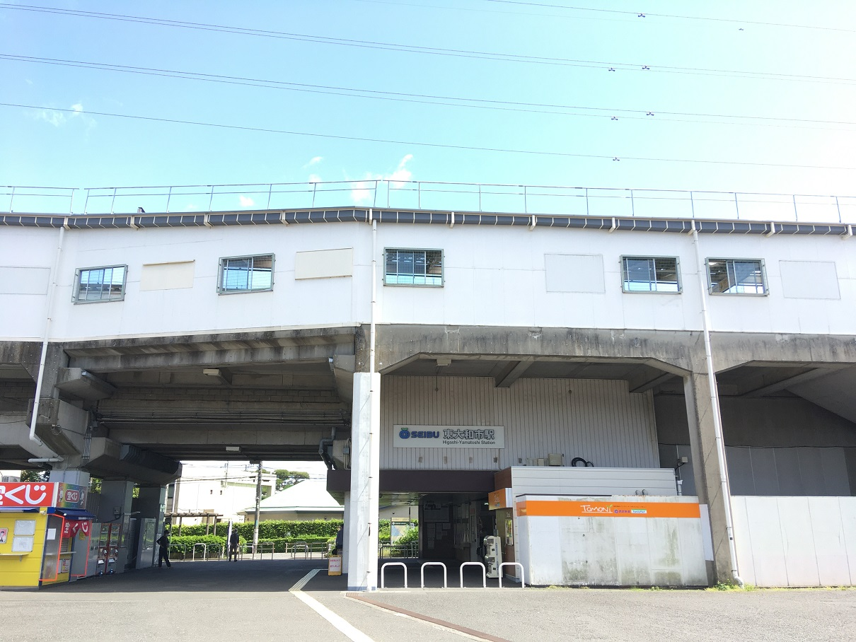 東大和市駅舎